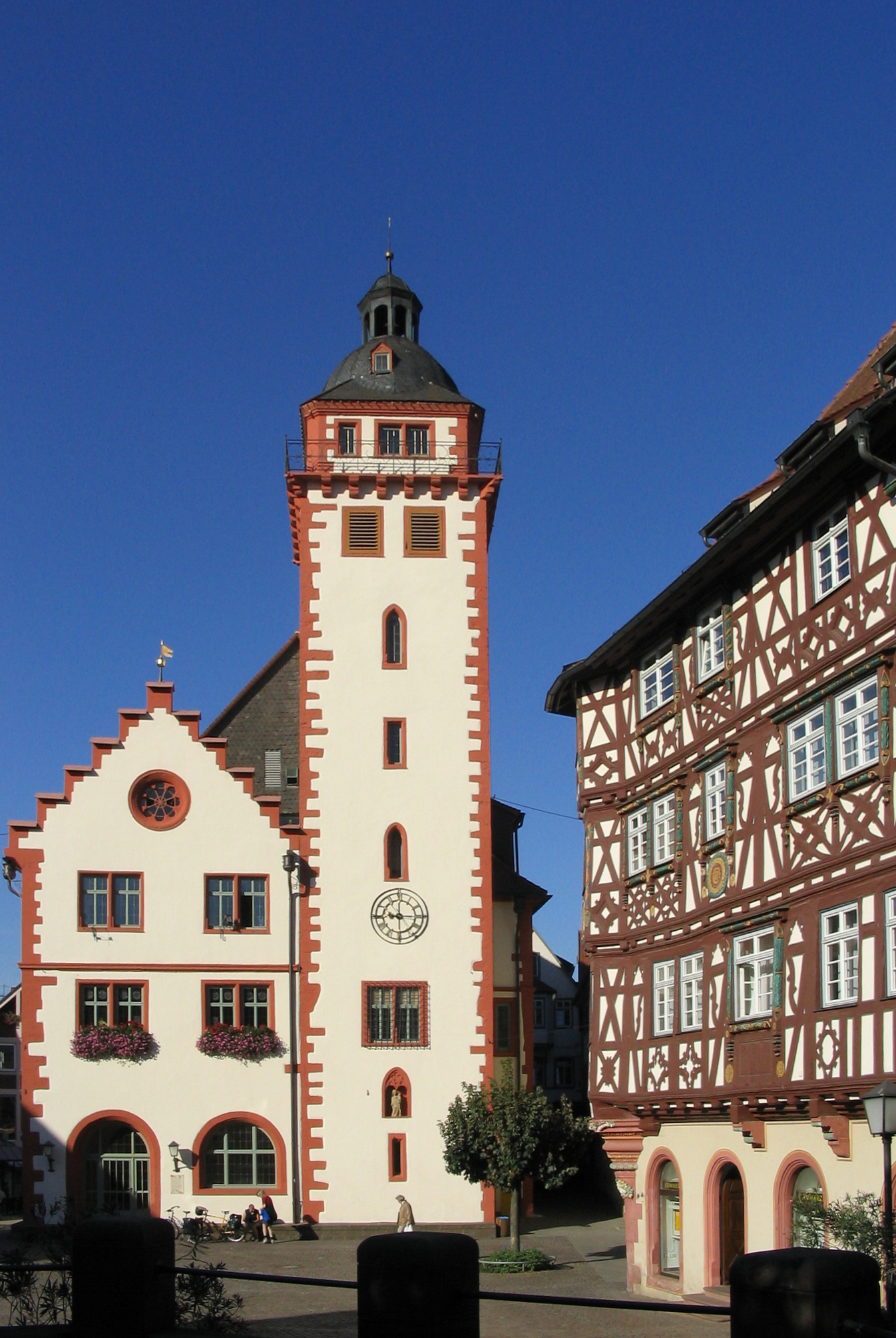 Description in de wikipedia Beschreibung: Rathaus am Marktplatz der Stadt Mosbach mit dem Palmschen Haus am rechten Bildrand Quelle: eigenes Bild Datum: September 2003 Fotograf: AlterVista Lizenzstatus: GNU_FDL